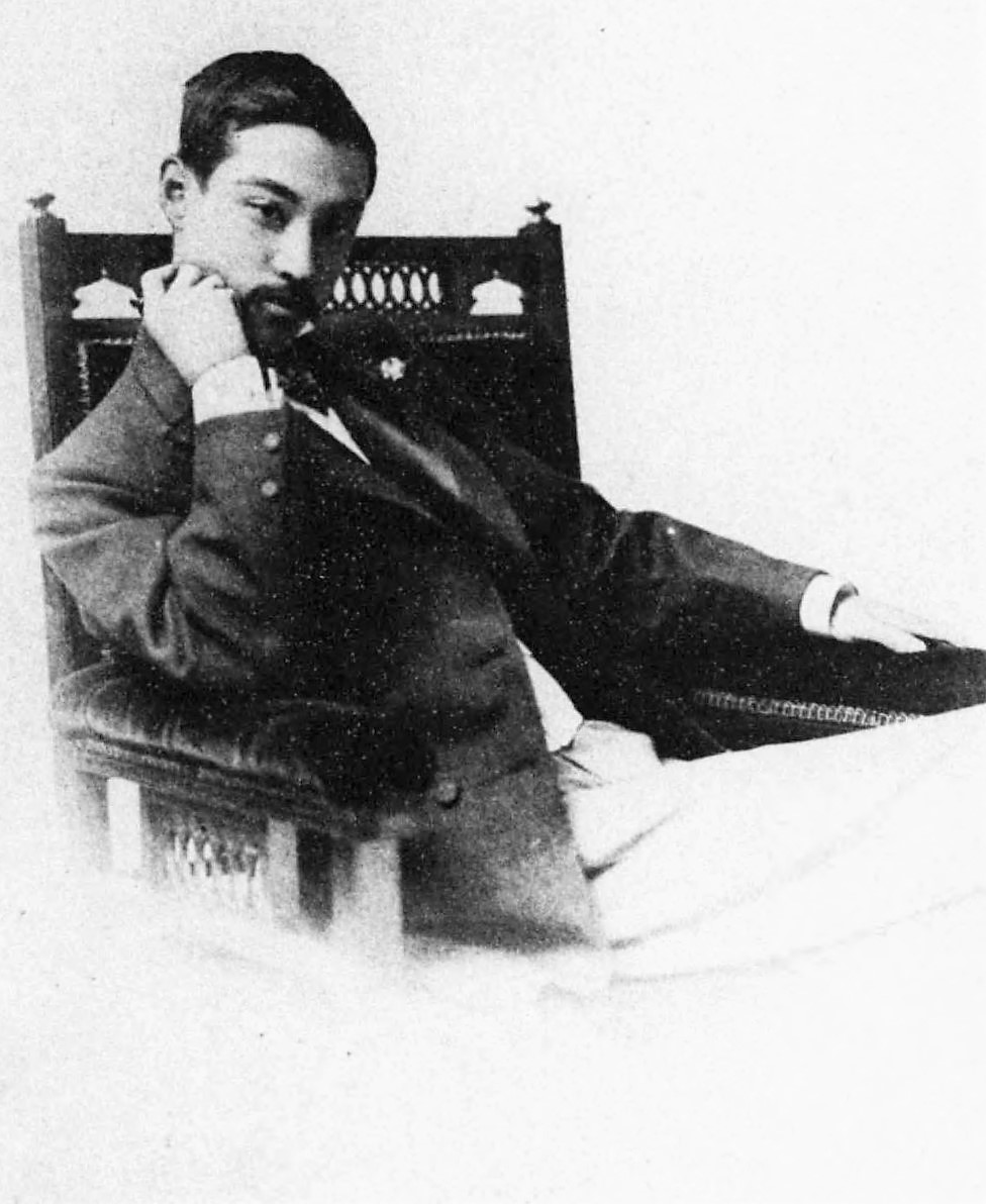 古河潤吉（陸奥宗光と最初の妻・蓮子との次男）。